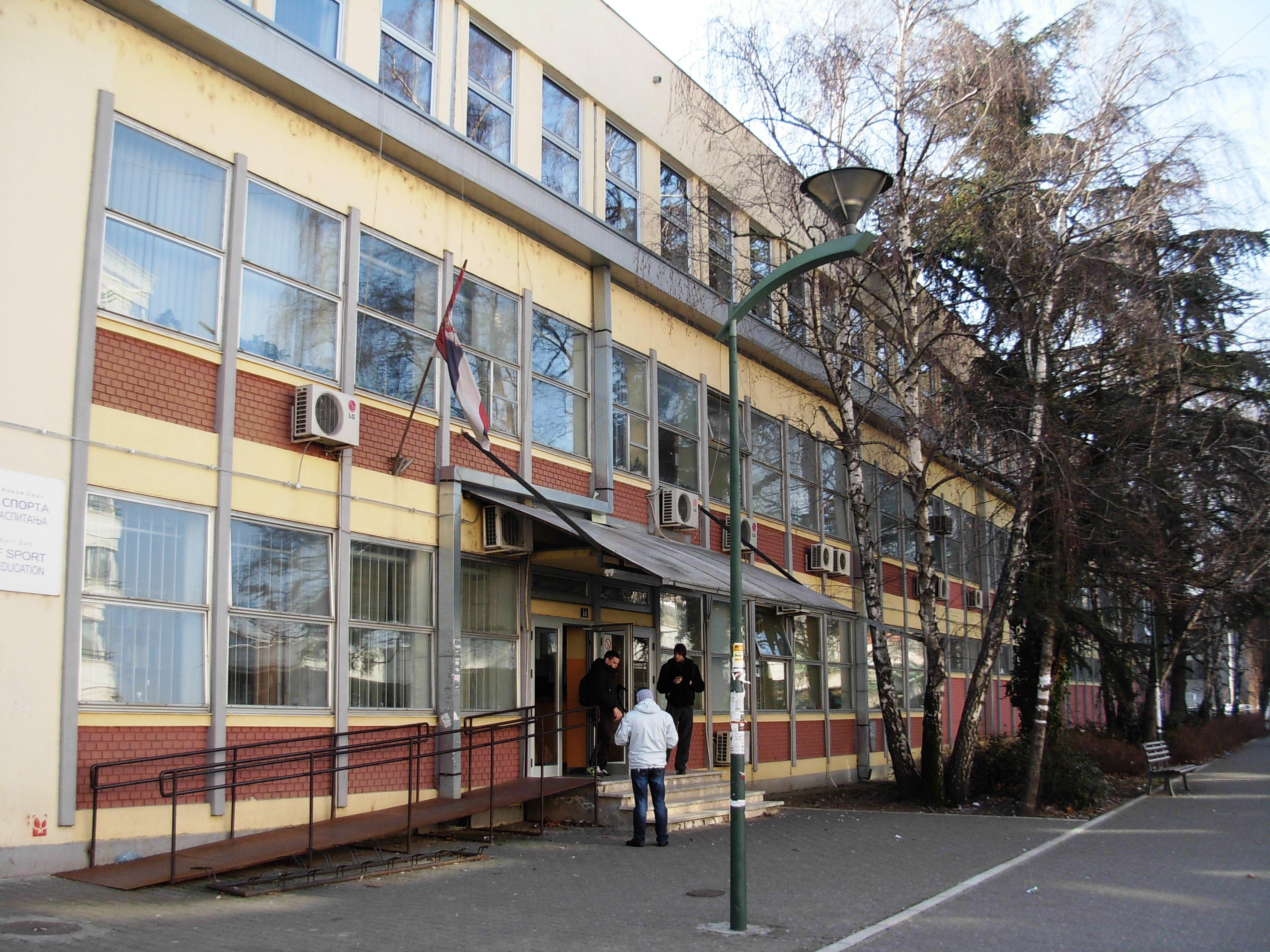 Fakultet sporta i fizičkog vaspitanja Novi Sad.